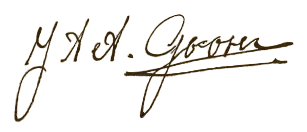 Jan Goosen signature.